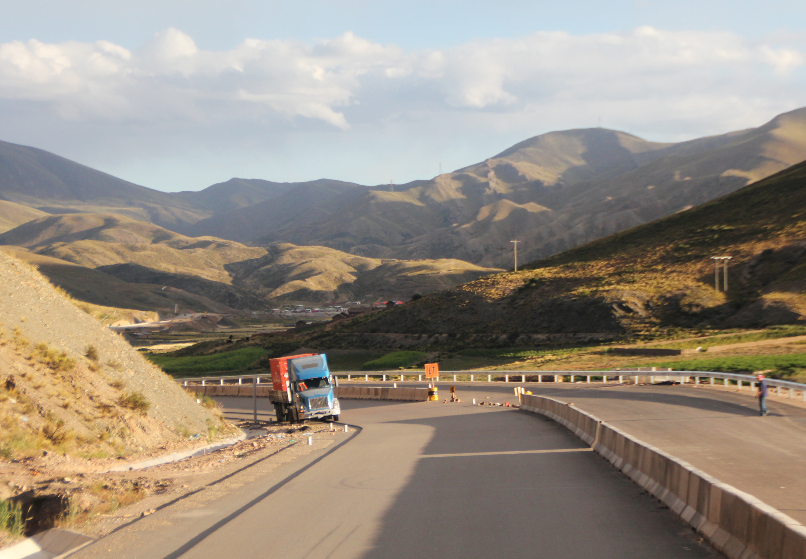 Entrée dans la province d'Oruro à proximité du hameau de Lequepalca, vue de la RN4 en Bolivie